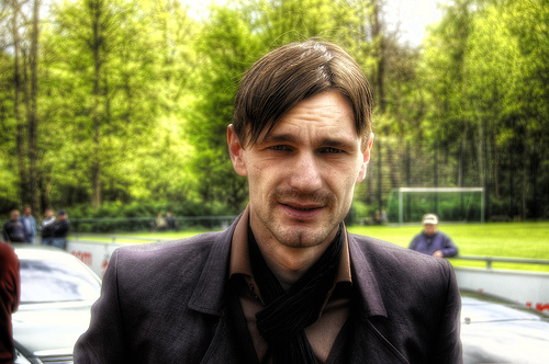 Milivoje Novakovič in 2008